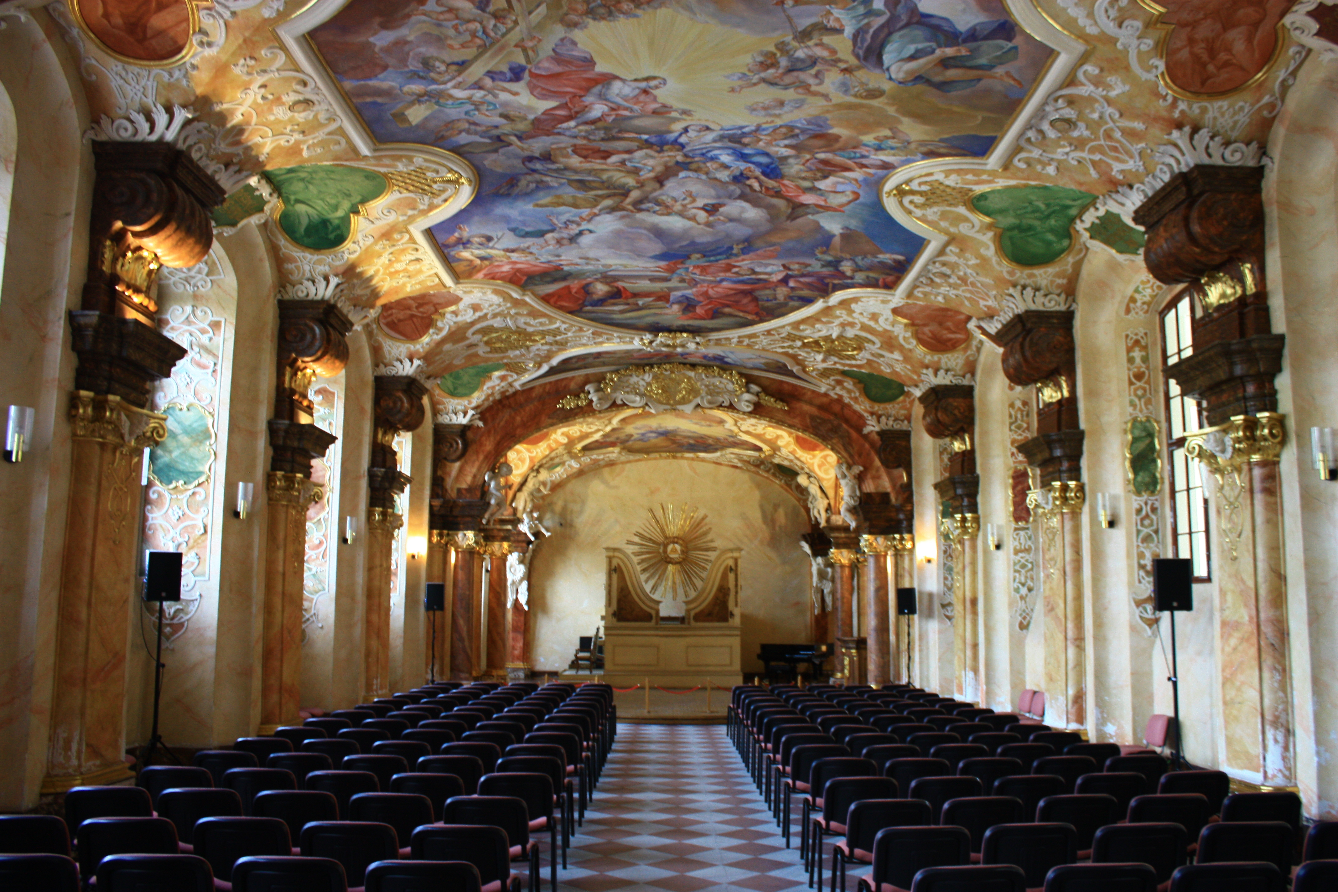 Wrocław, kolegium jezuickie, ob. Uniwersytet Wrocławski